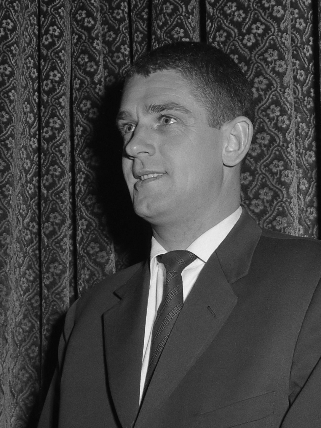 Uitreiking medailles voor de beste honkballers, Nol Houtkamp 19 januari 1961